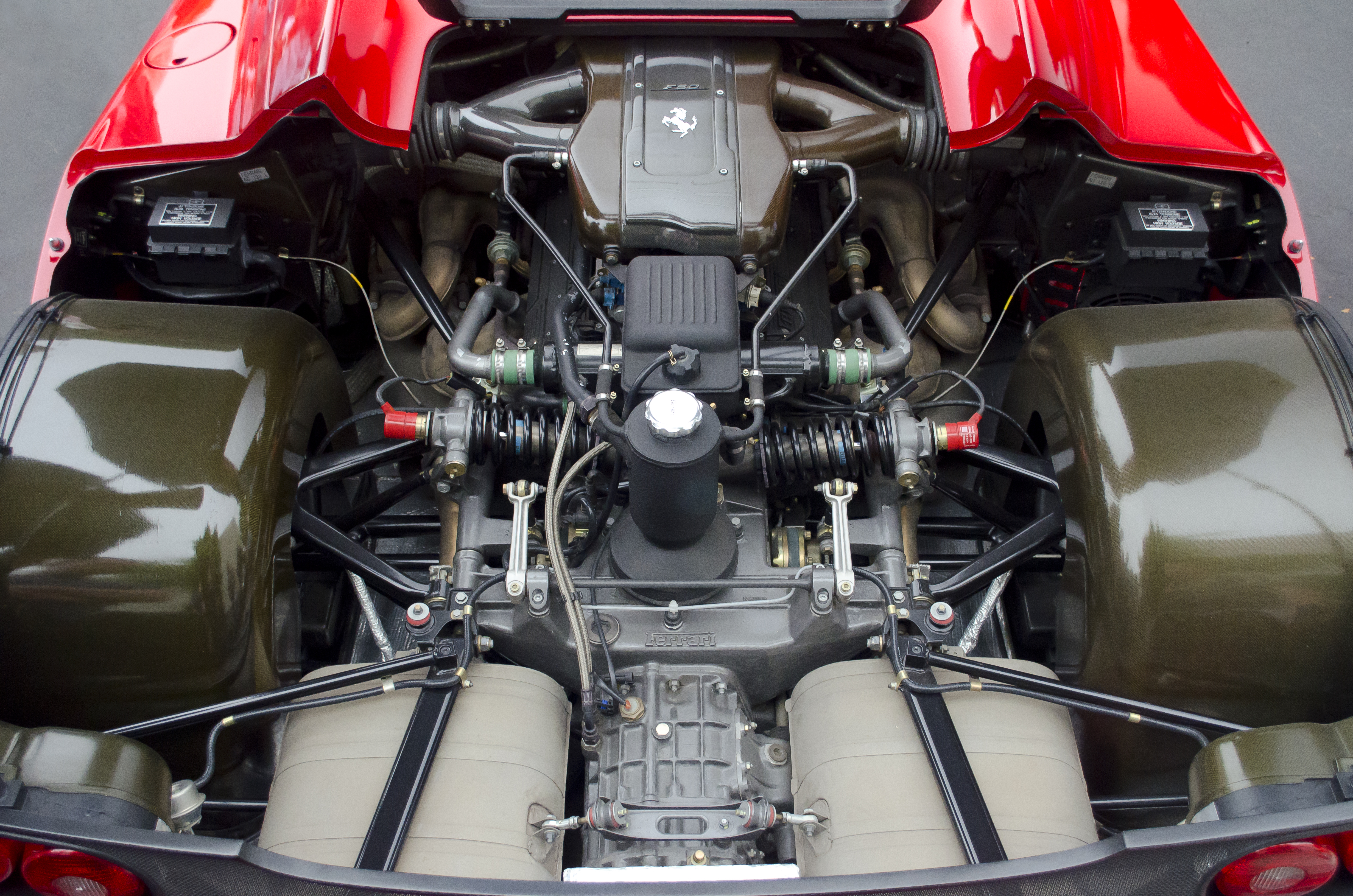 Ferrari F50 Engine Bay